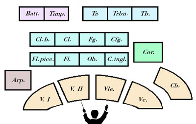 Srpskohrvatski / српскохрватски: Raspored muzičara u orkestru, crtež